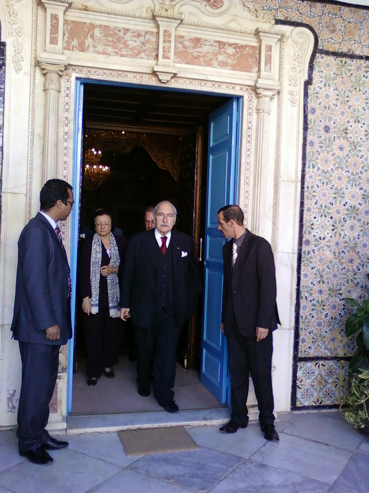 Foued Mbazzaa sortant du bureau de la présidence da la Chambre des Députés comme Président de la République Tunisienne par intérim le 15 janvier 2011 après le serment.